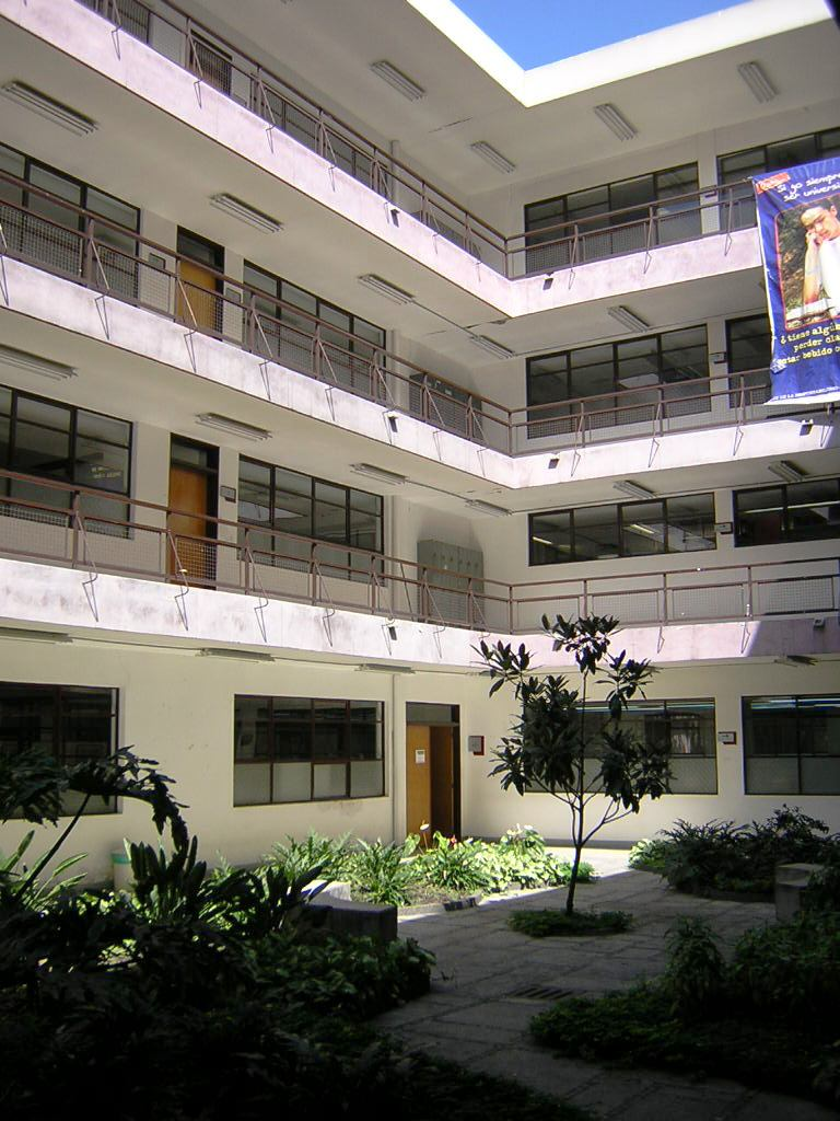 Facultad de Enfermería, Área de la Salud, Universidad de Antioquia, Medellín, Colombia (esta foto la tome yo, y la libero al dominio público)